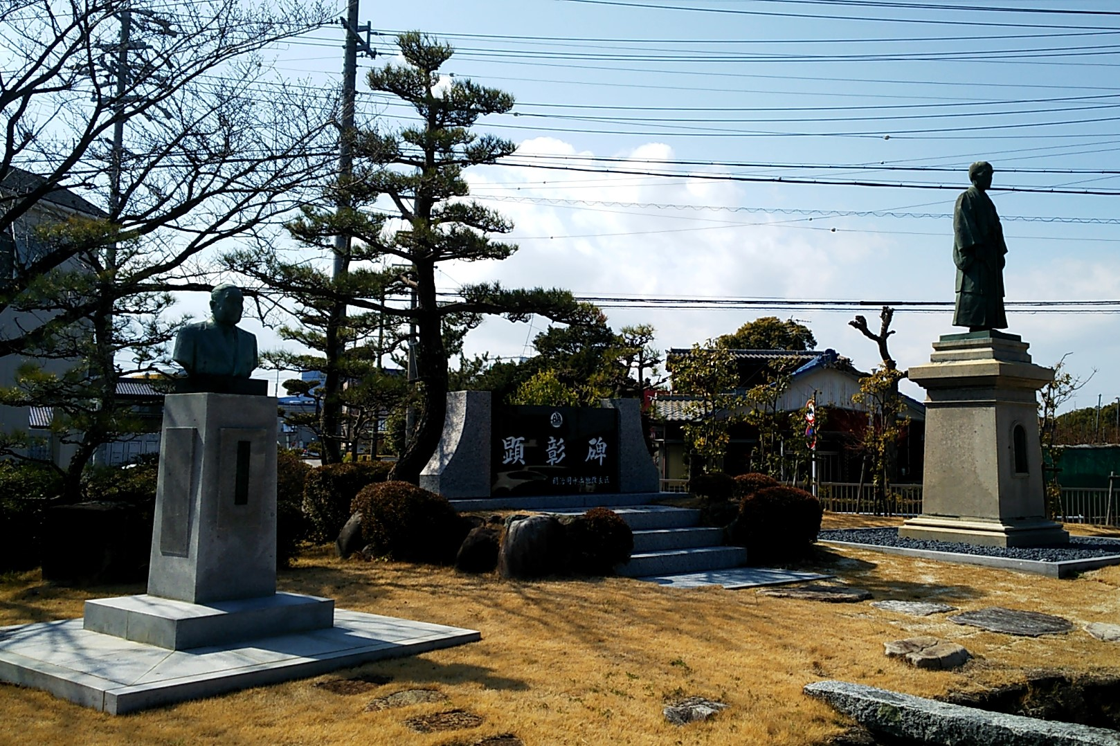 明治用水会館の敷地にある銅像。愛知県安城市。左の胸像は第2代安城市長の石原一郎。右の立像は「用水の神様」安城町長の岡田菊次郎。